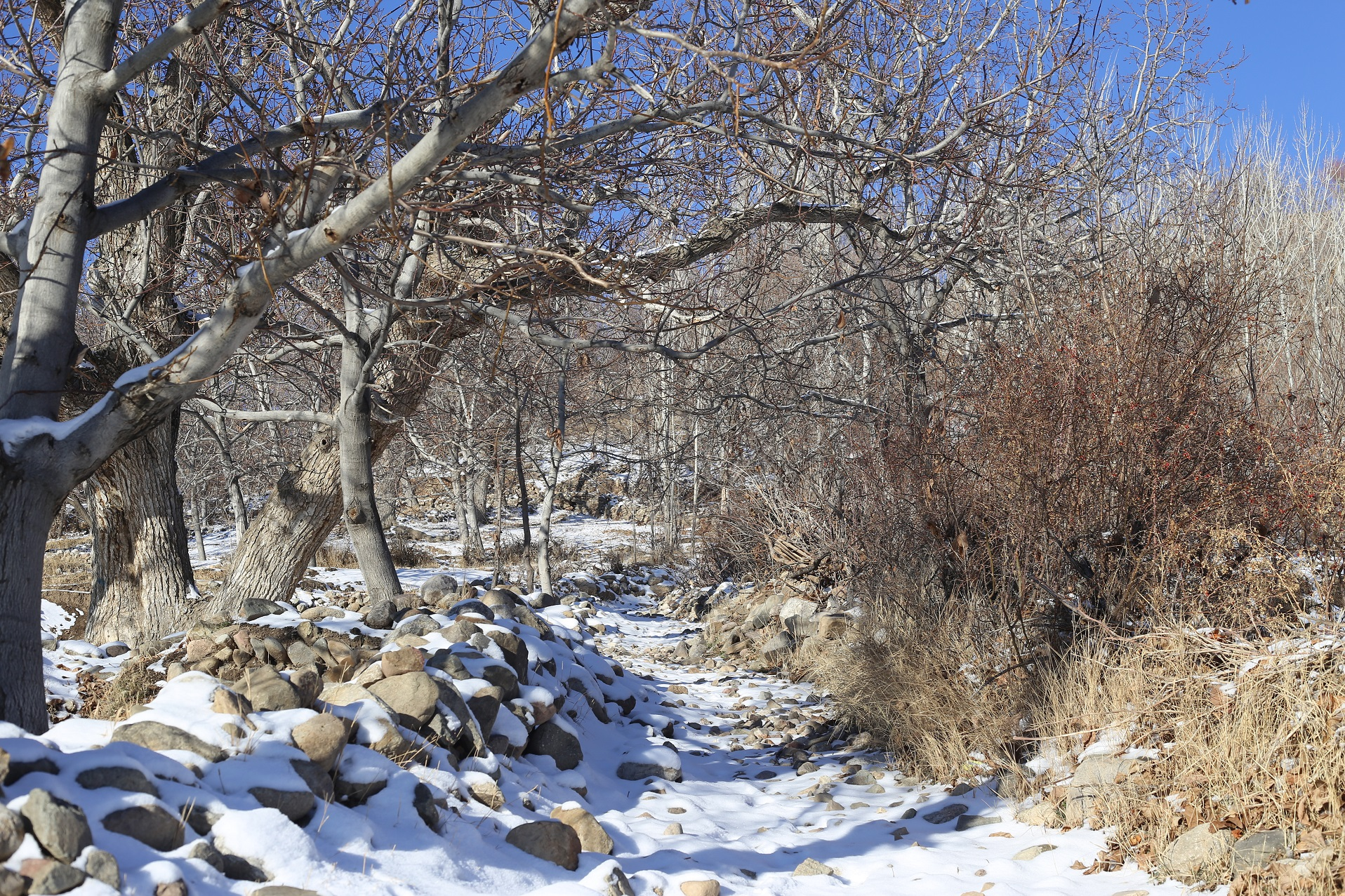 کوچه باغ های روستای جهان عکس از احمد نیک گفتار